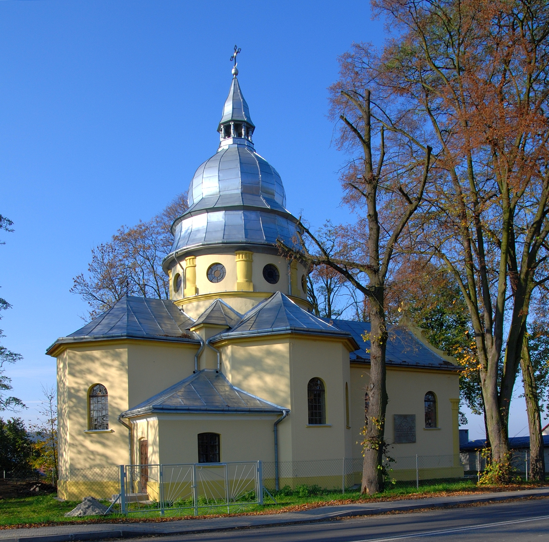 wieś Dubiecko